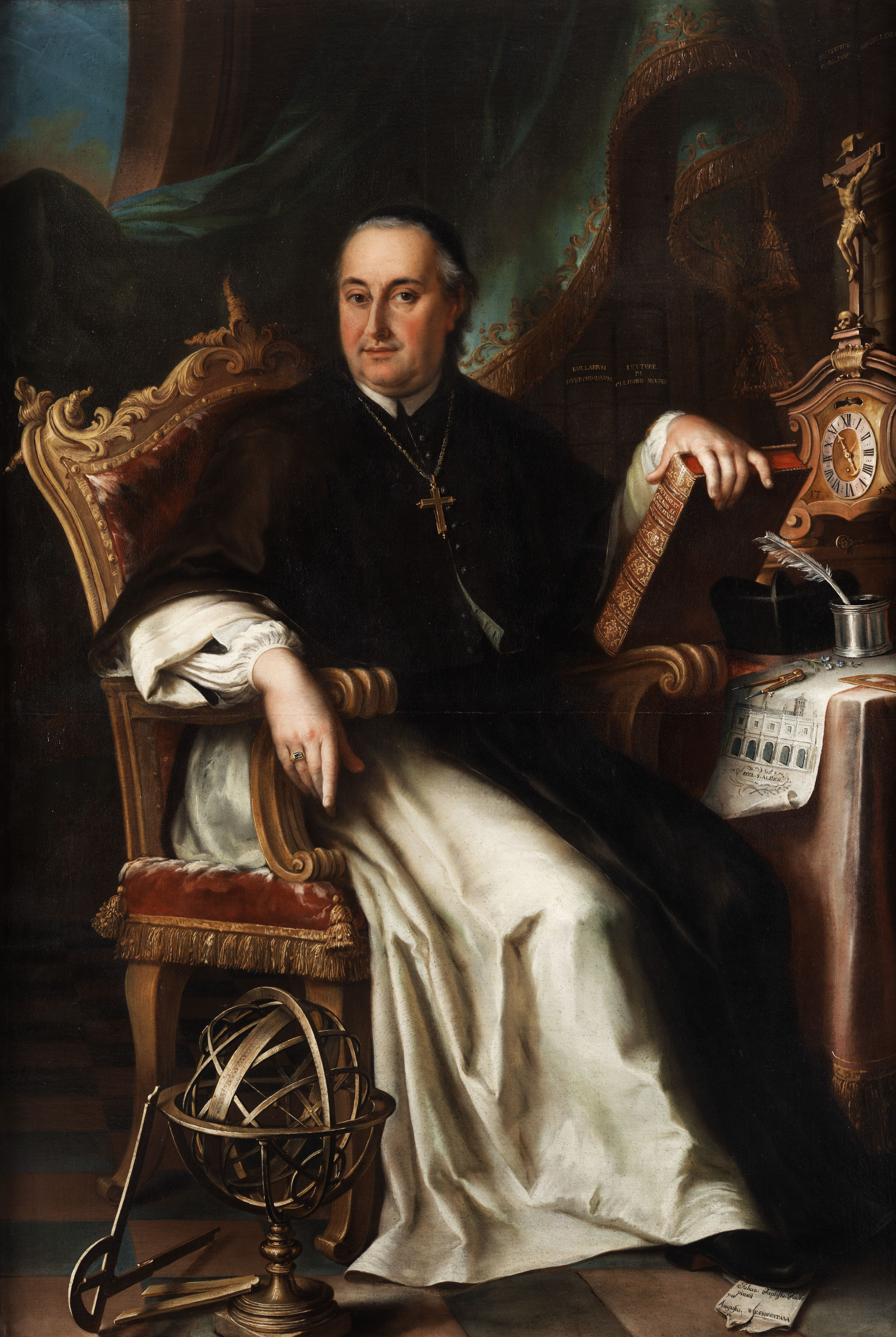 Portrait des Felice Nerini, Abt des Hieronymus-Konvents von St. Alessio auf dem Aventin in Rom und Generalprokurator der Hieronymiten. Öl auf Leinwand. 180 x 123 cm